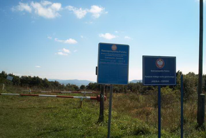 Polish info table on the Beskid over Czeremcha pass (pol. przelęcz Beskid nad Czeremcha, słow. Čertižské sedlo), 581 m n.p.m.